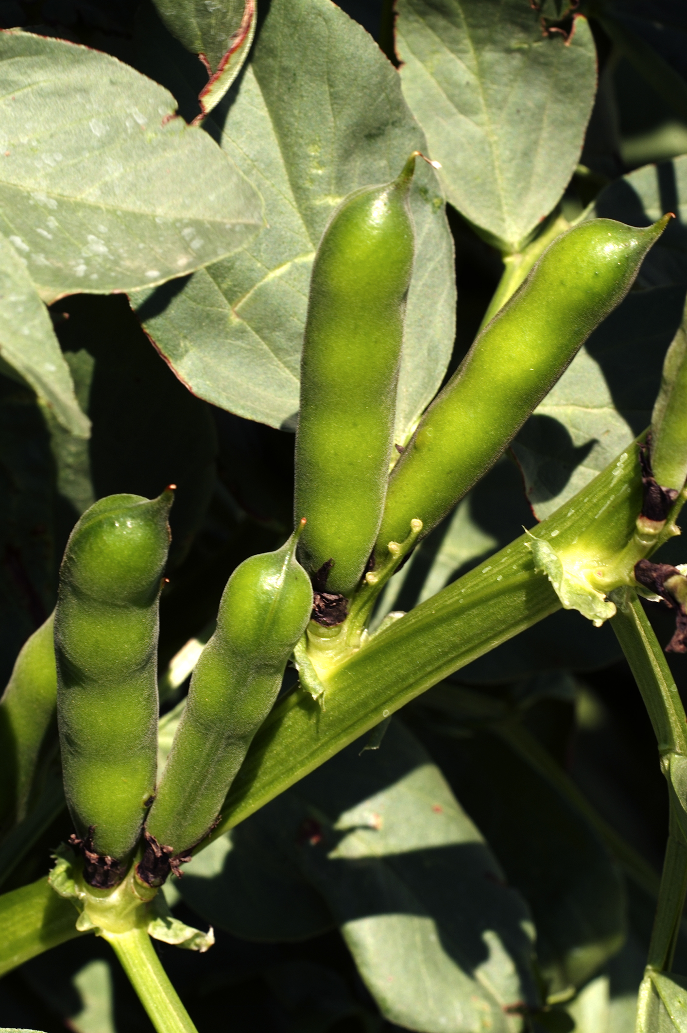 INRA, Jean Weber